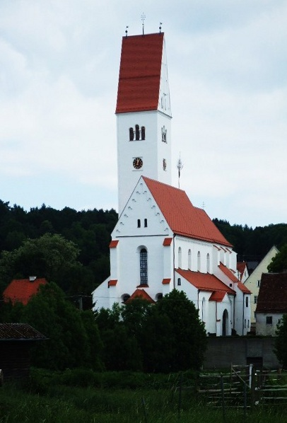 Pfarrkirche Mariä Himmelfahrt, Kirchhaslach, Landkreis Unterallgäu